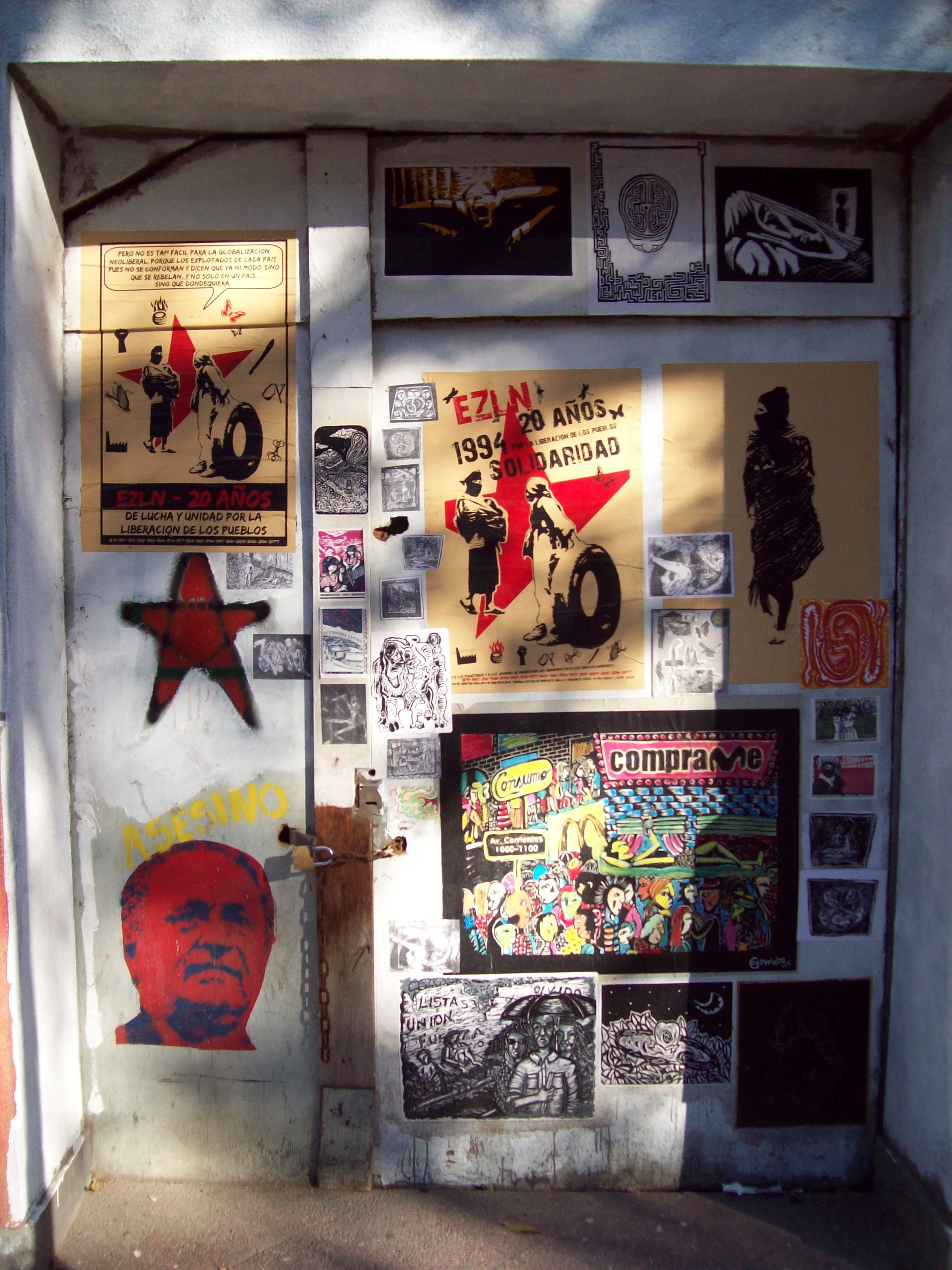 Varios memoriales a los piqueteros asesinados en la ex estación Avellaneda, actualmente llamada Dario y Maxi (Avellaneda) en sus honores.